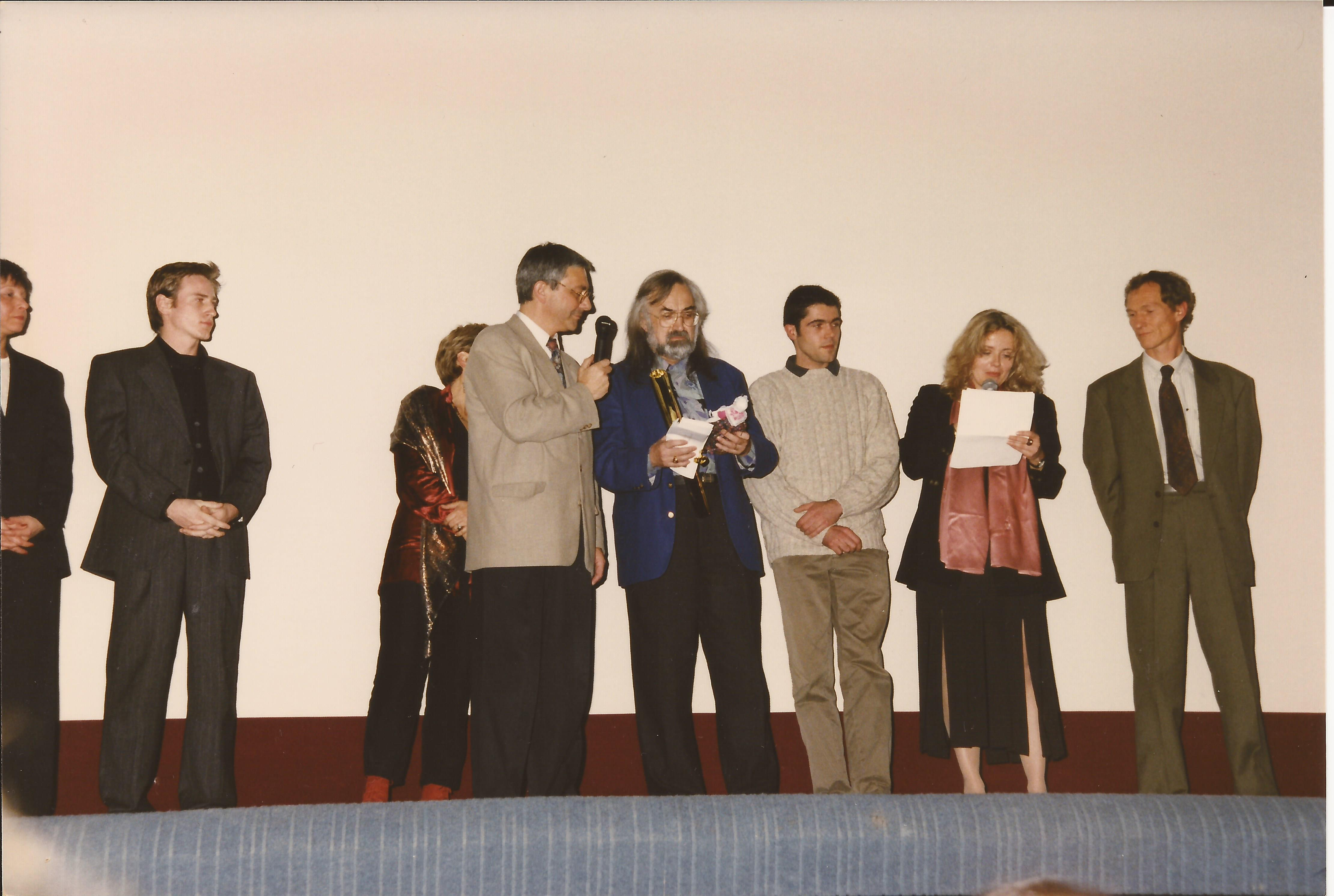 Le palmarès du Festival des Passion est décerné en présence de Benoit Magimel et Sophie Barjac (membres du jury)